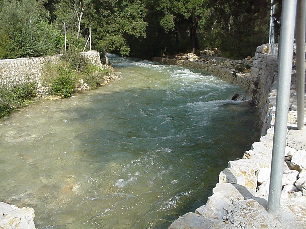 Torrent de Sant Miquel. Mallorca.